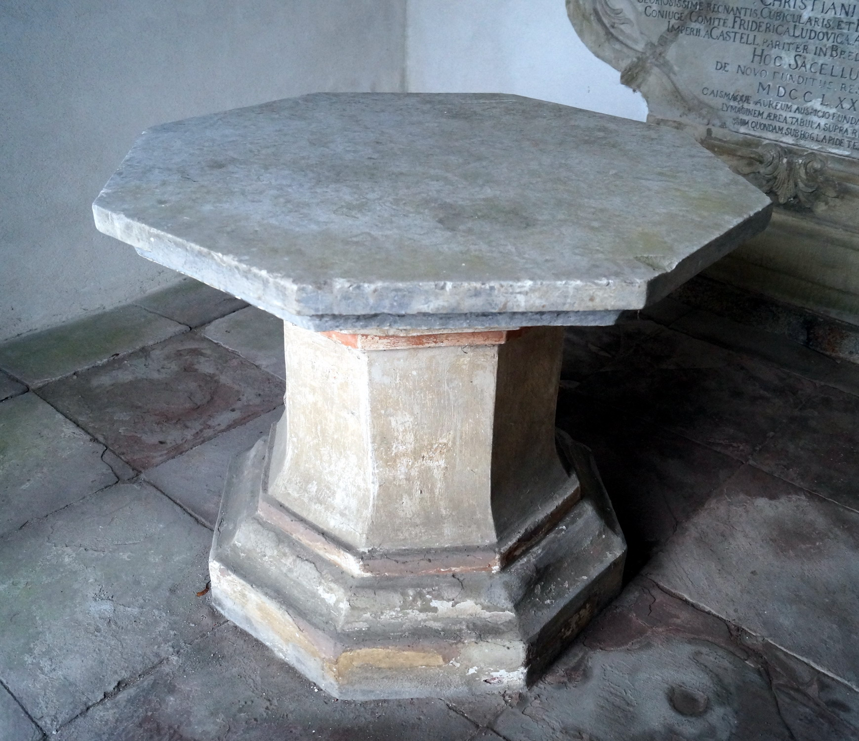 Oktogonaler Altar in der Kapelle, ursprünglich aus der Pyramide von 1588